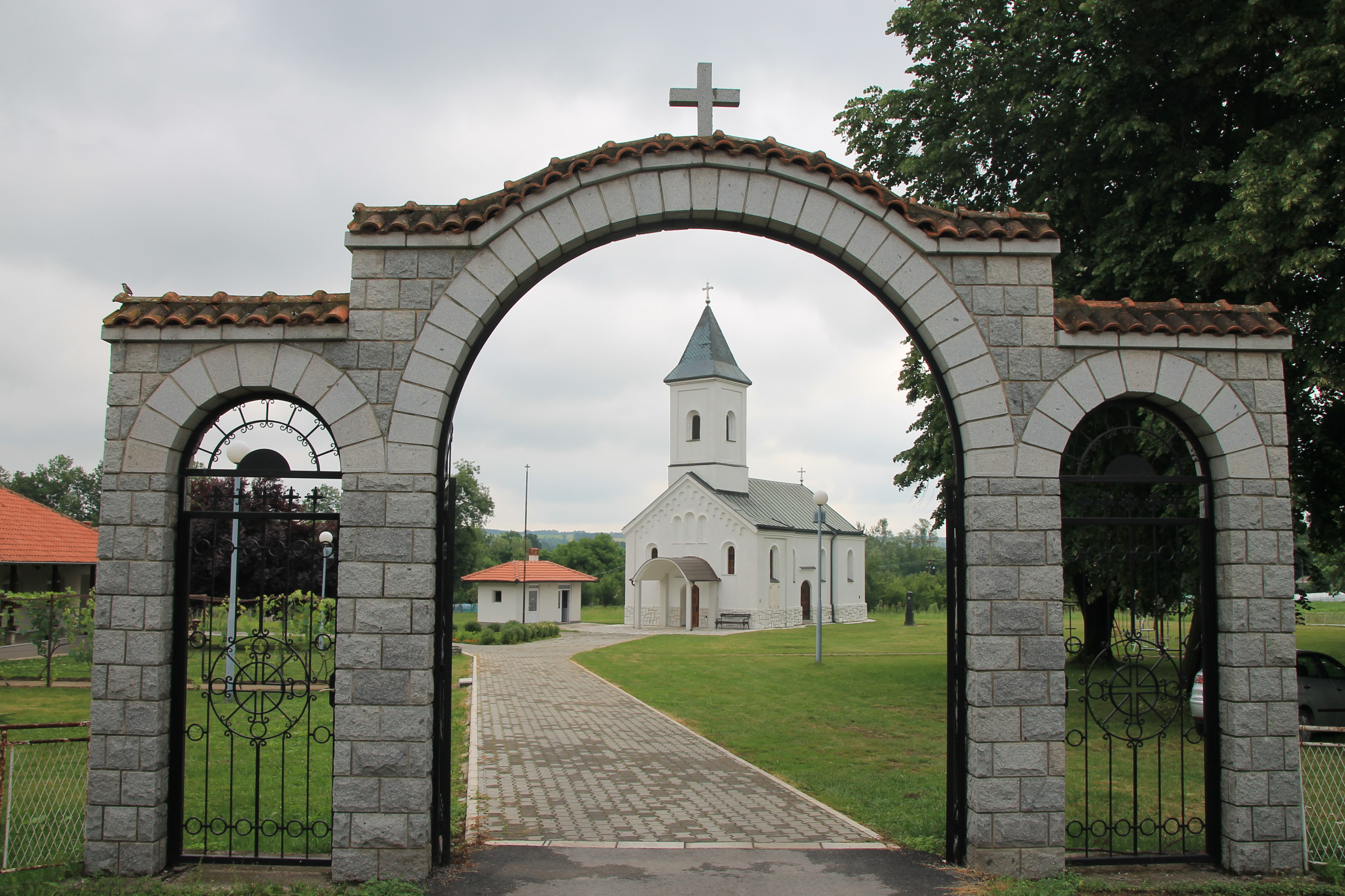 Crkva Silaska Sv. Duha (Junkovac)